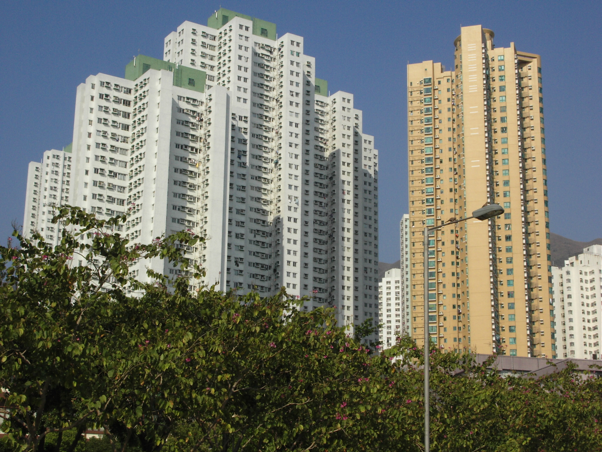 鑽石山zh:私人屋苑: 宏景花園 & 帝峰豪苑